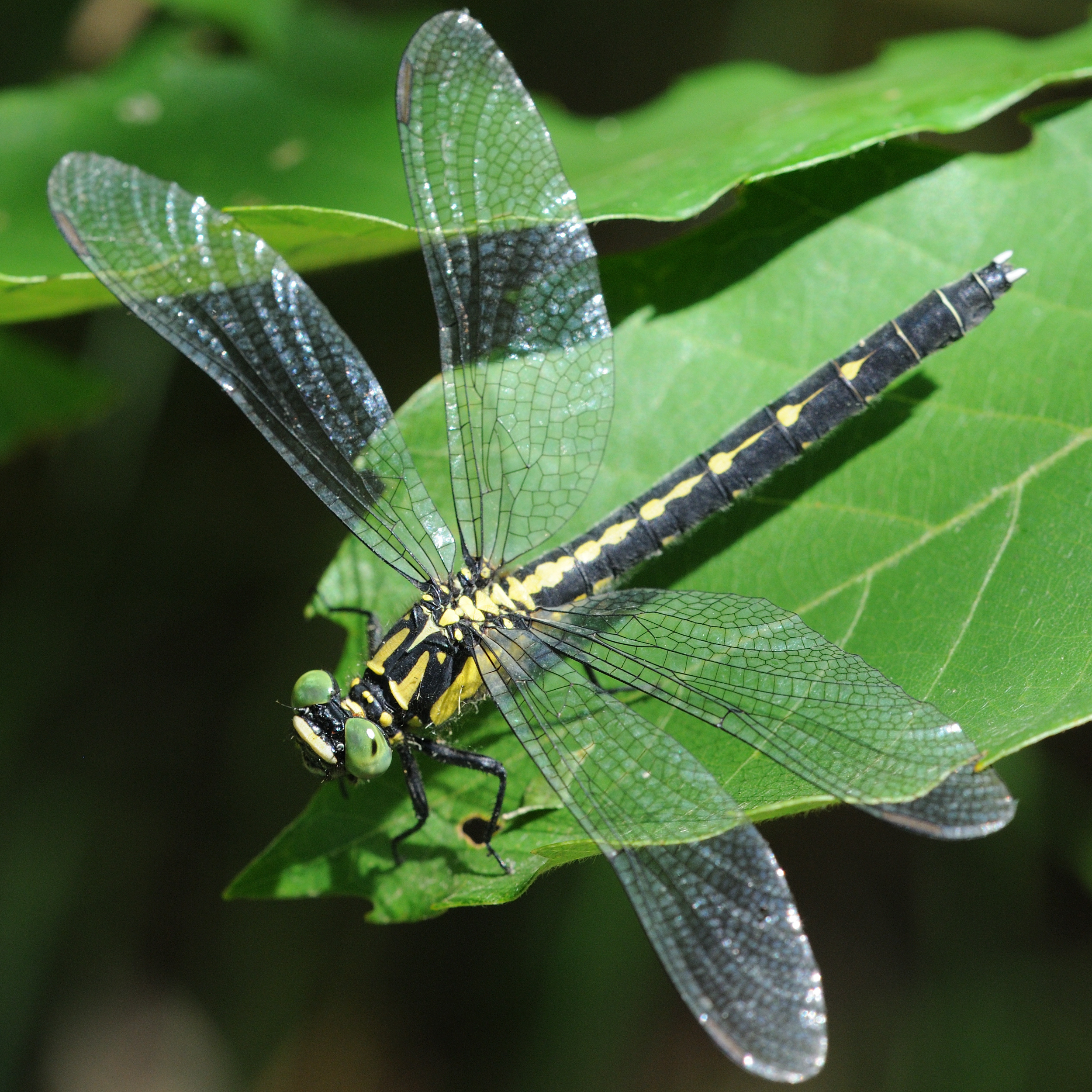 タベサナエ雌 広島県